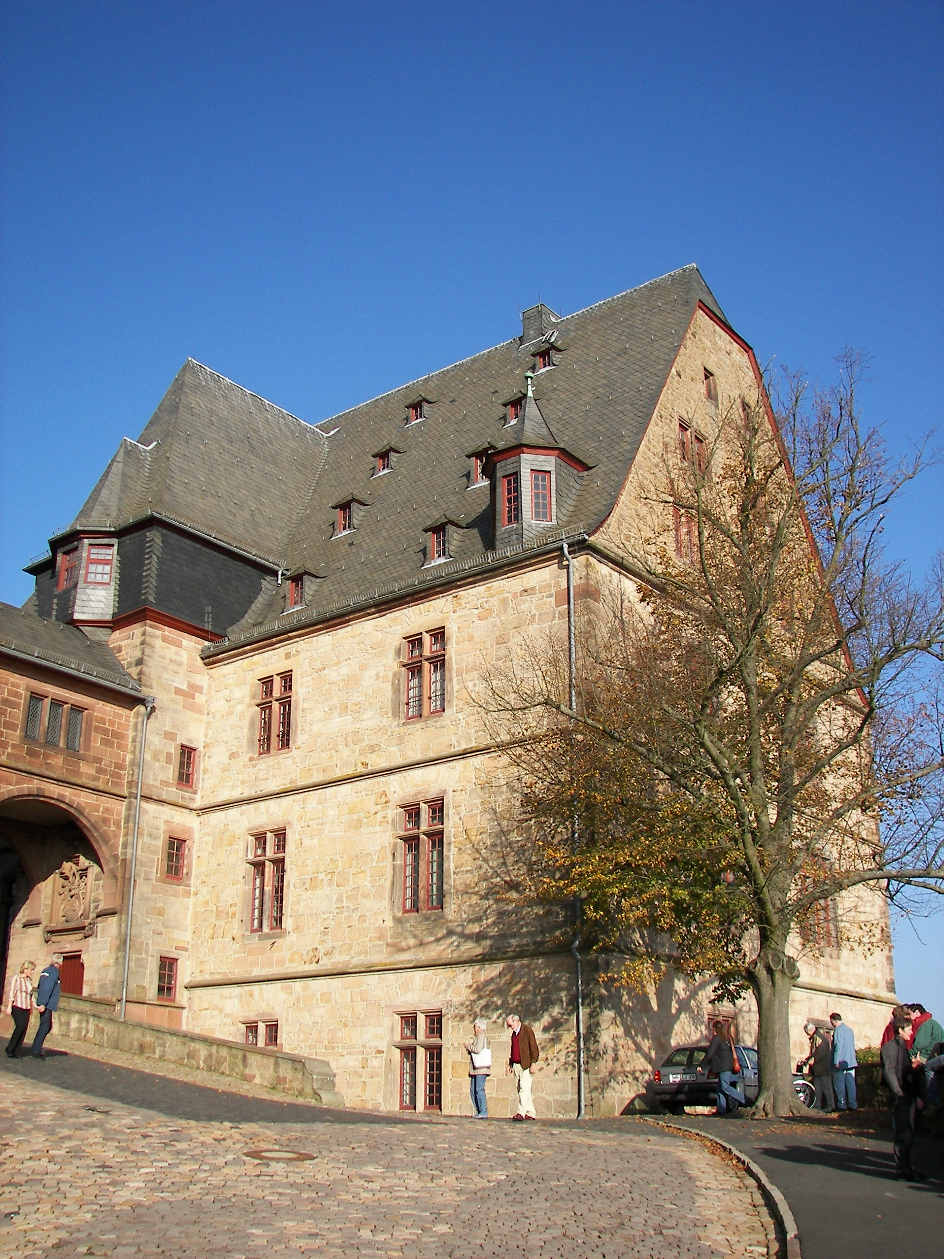 Marburger Schloss, Wilhelmsbau